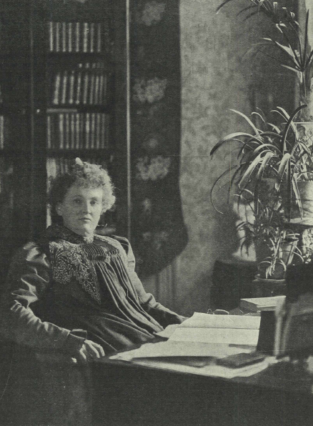 Alfhild Agrell i Idun 1909